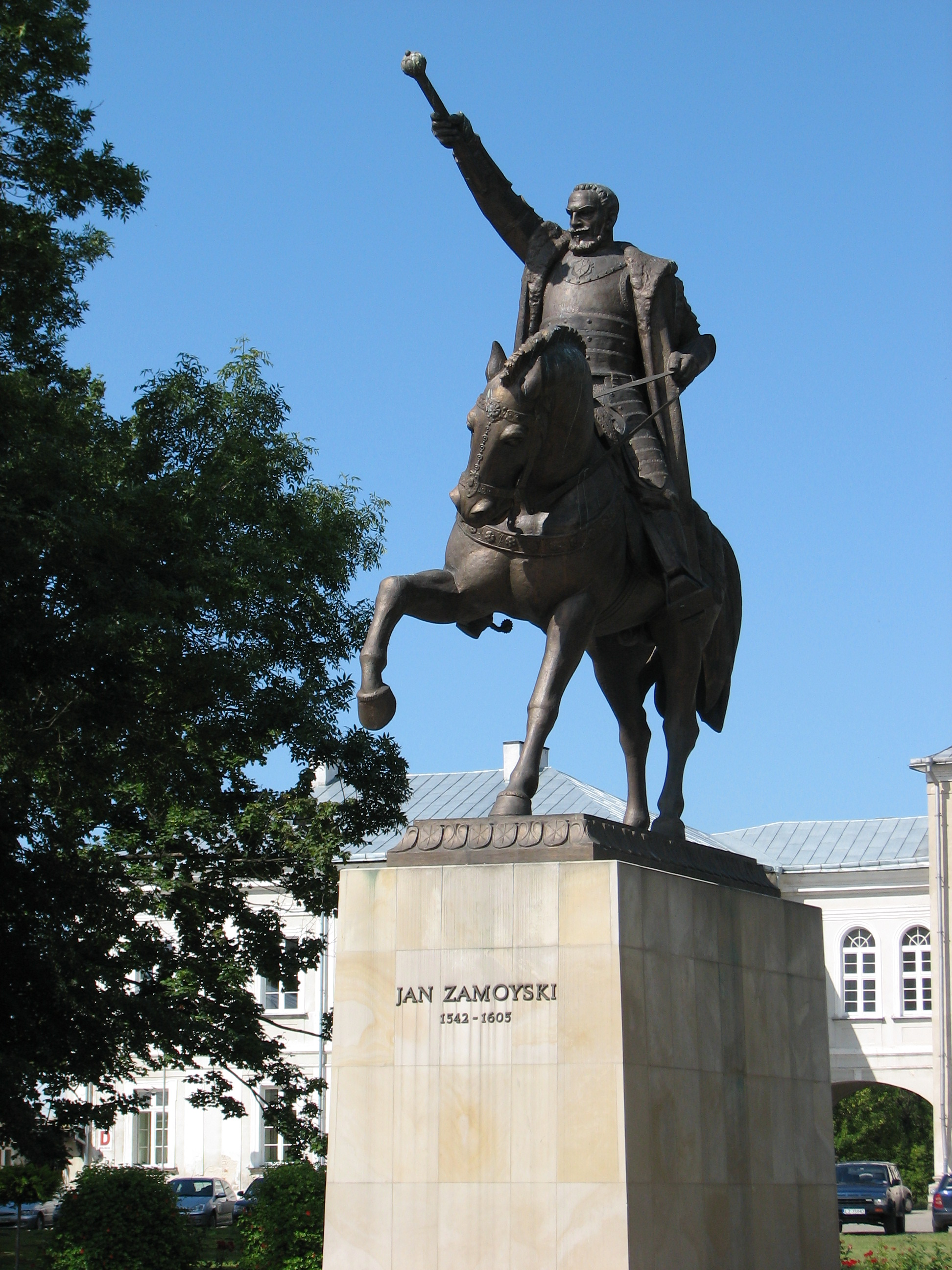 założyciel Zamościa. This image has been originally created as the illustration for imię śpiewaka z Zamościa entry in crosswords dictionary. It has been released under CC-BY-3.0 license.